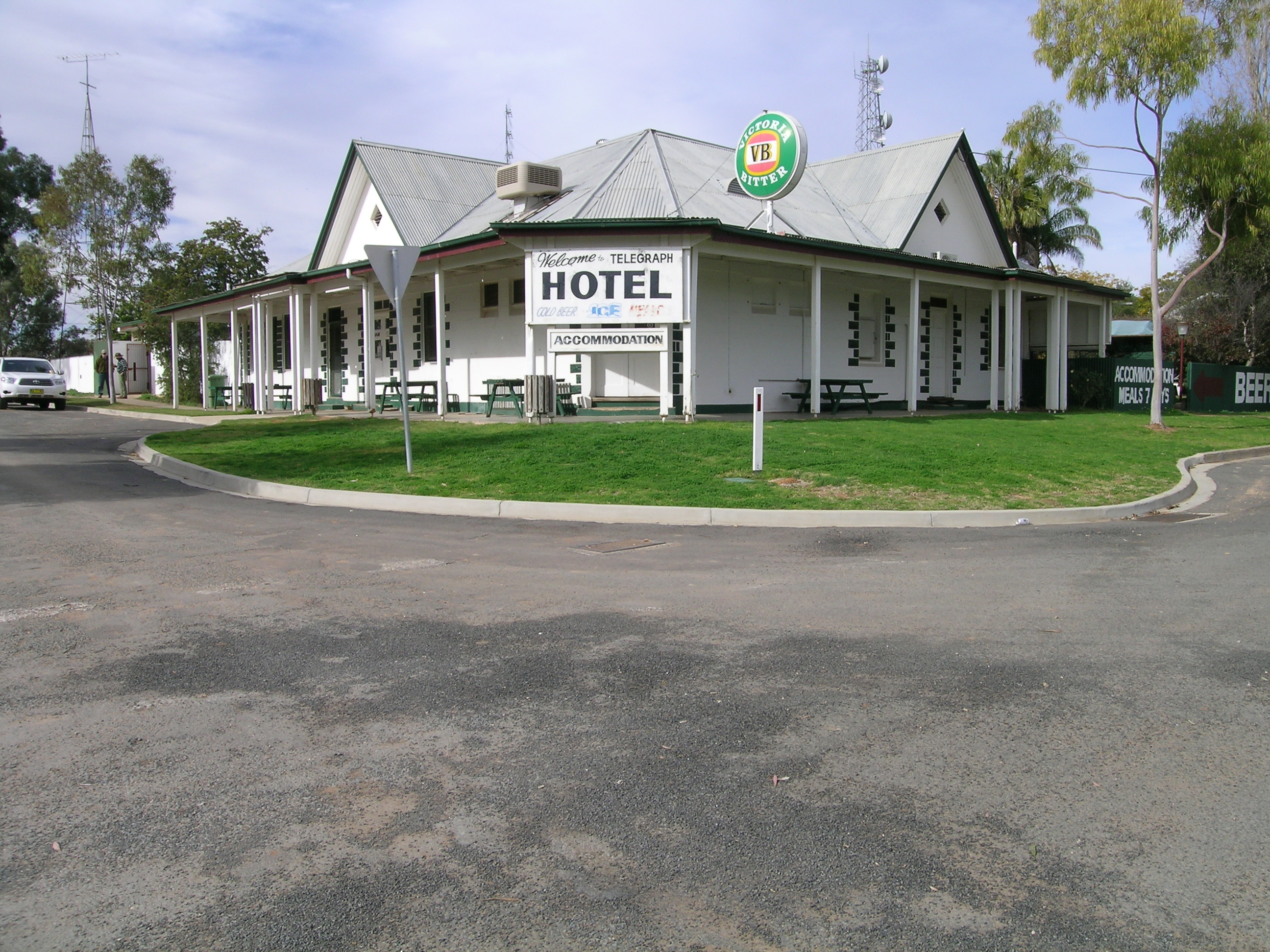 Hotel at Pooncarie, NSW